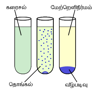 கரைசலிலிருந்து வீழ்படிவு உருவாதல்